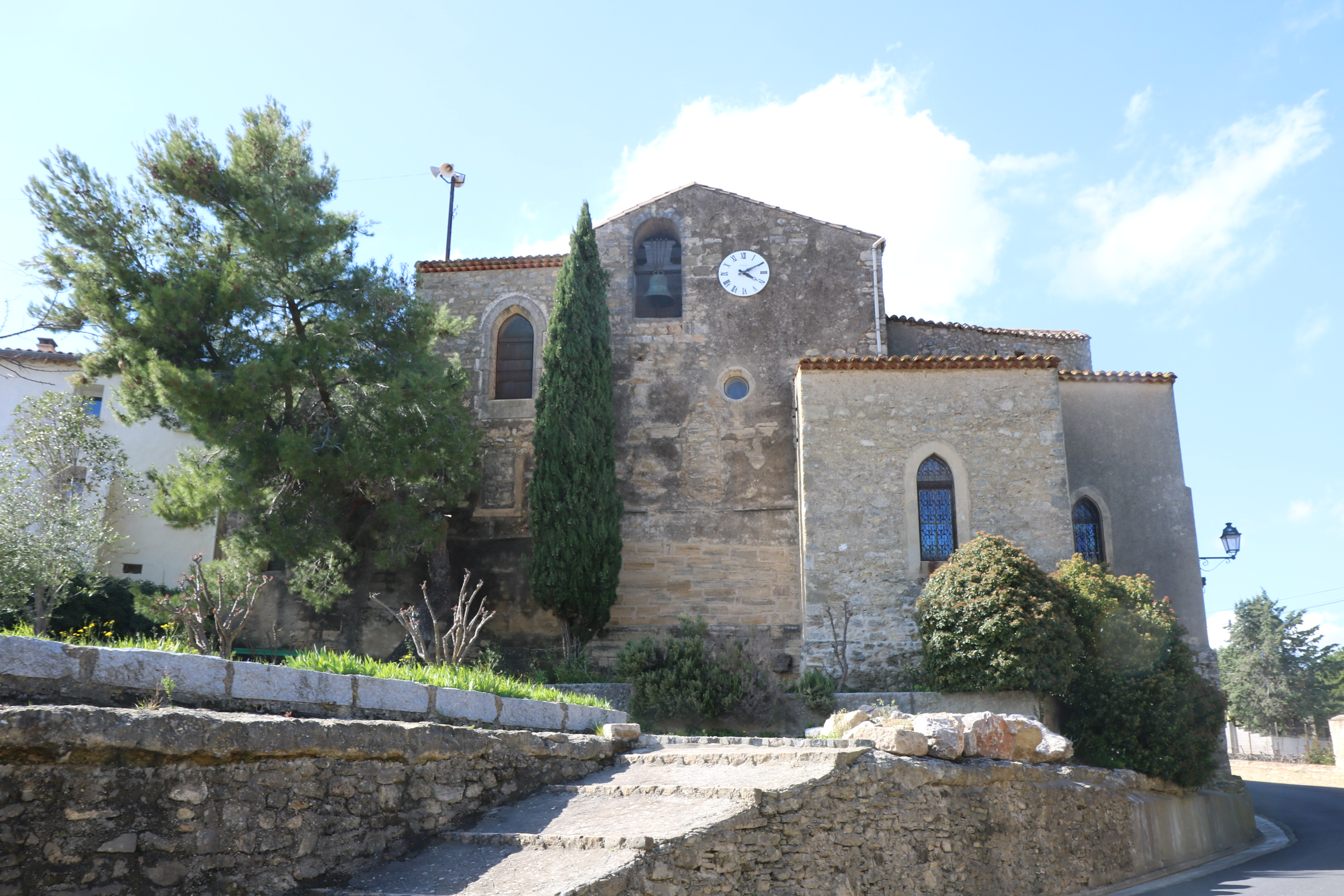 Coulobres (Hérault) - église Saint-Félix-de-Gérone - clocher